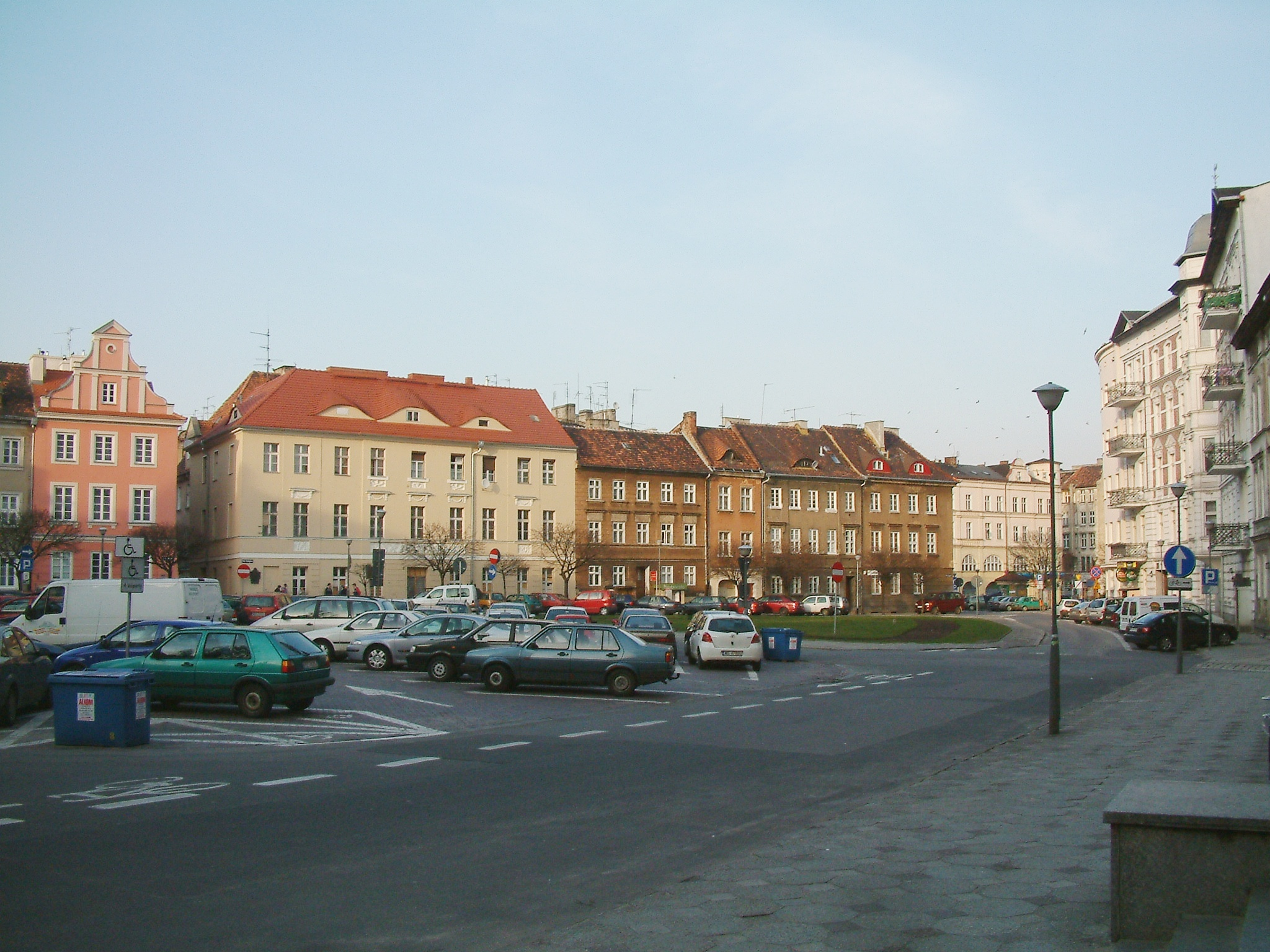 Plac Kolegiacki in Poznań